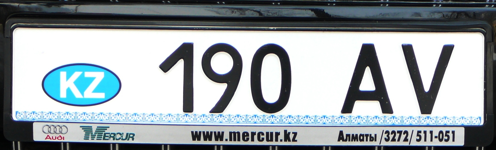 Номер автомобиля серии AV - обслуживающего депутатов Парламента Республики Казахстан